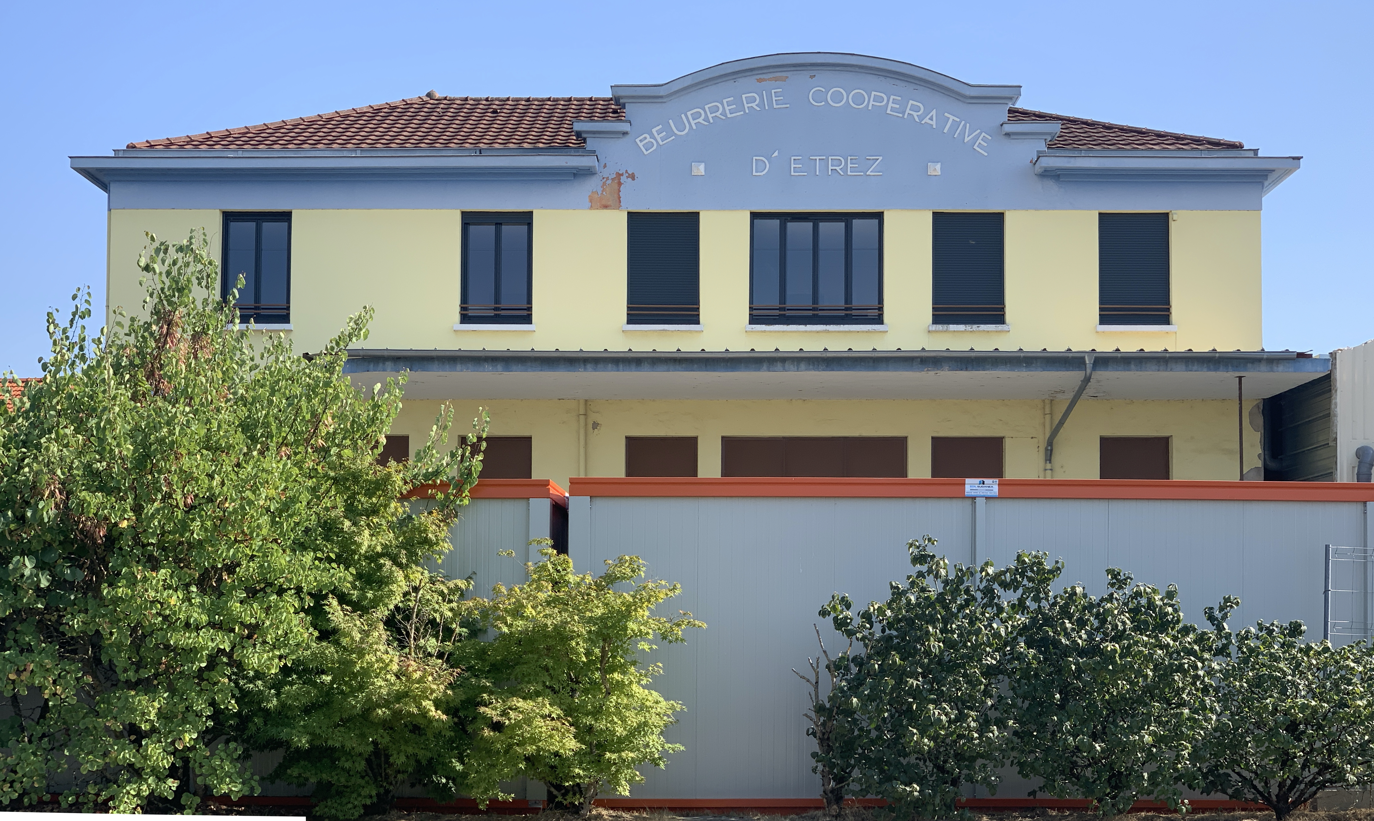 Laiterie coopérative d'Étrez, Bresse-Vallons.